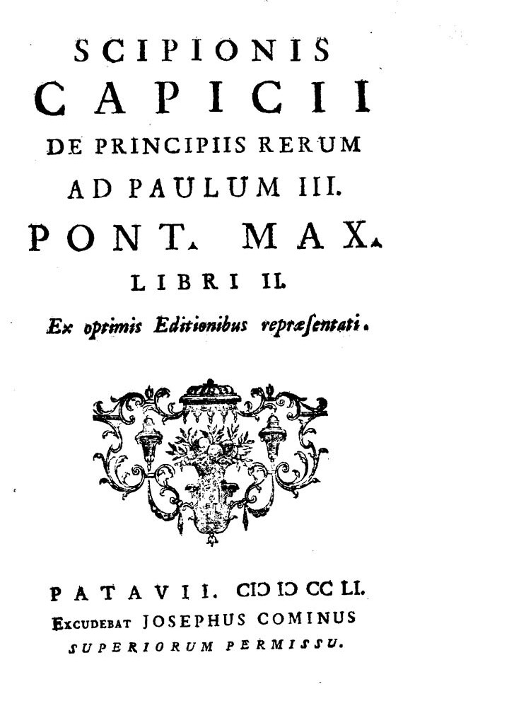 Frontespizio